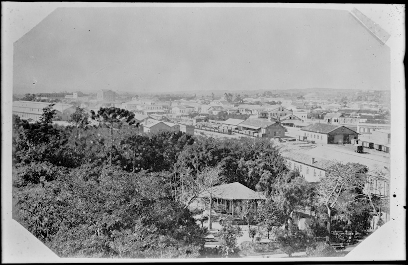 Obra que integra o acervo do Museu Paulista da USP. Coleção Militão Augusto de Azevedo.